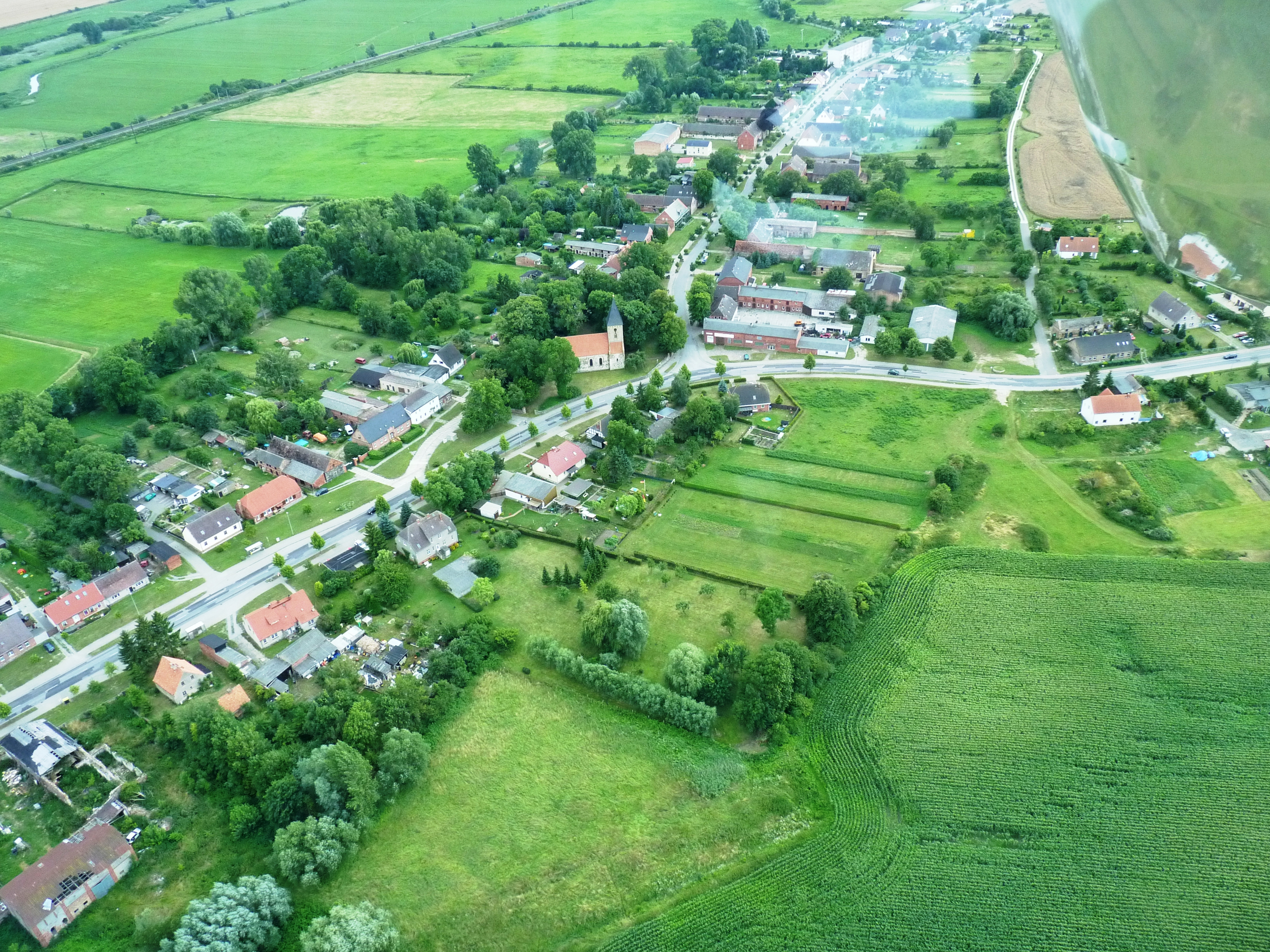 Papendorf Dorfansicht